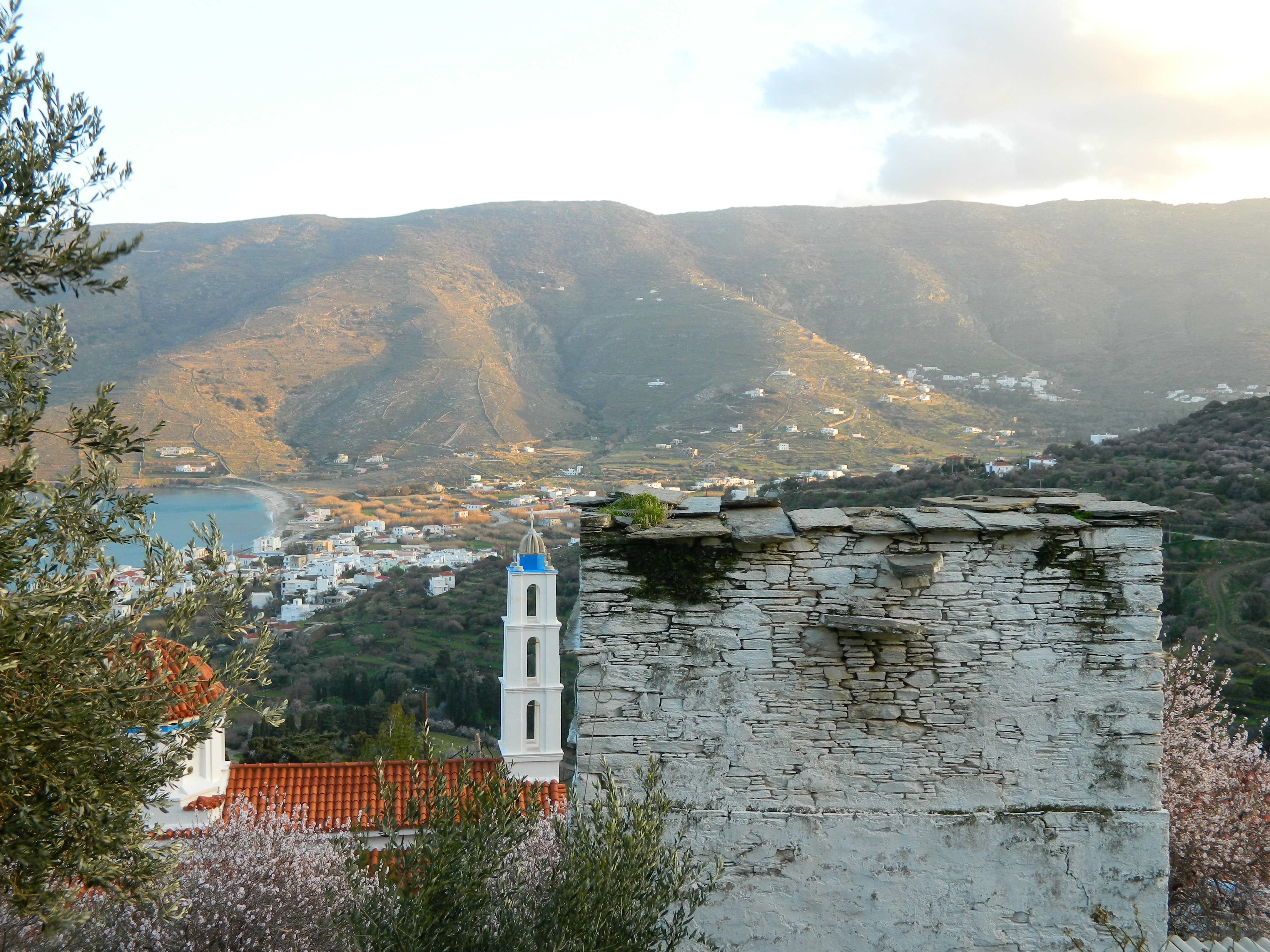 Όρμος του Κορθίου στην Άνδρο